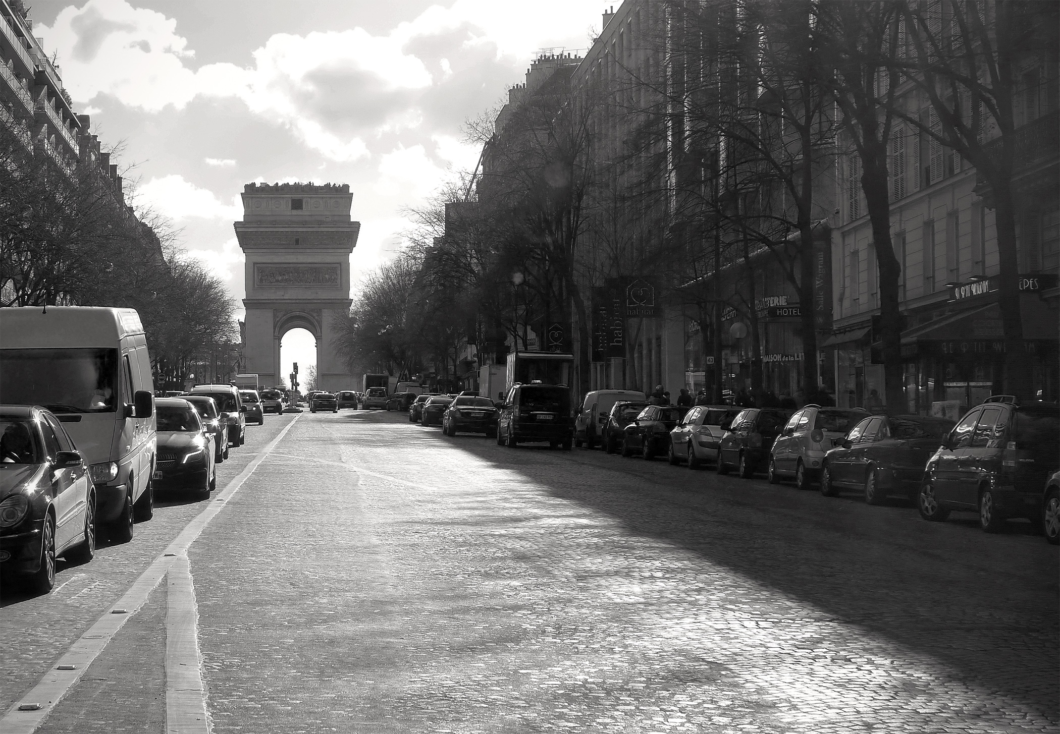 Avenue de Wagram - Paris XVII